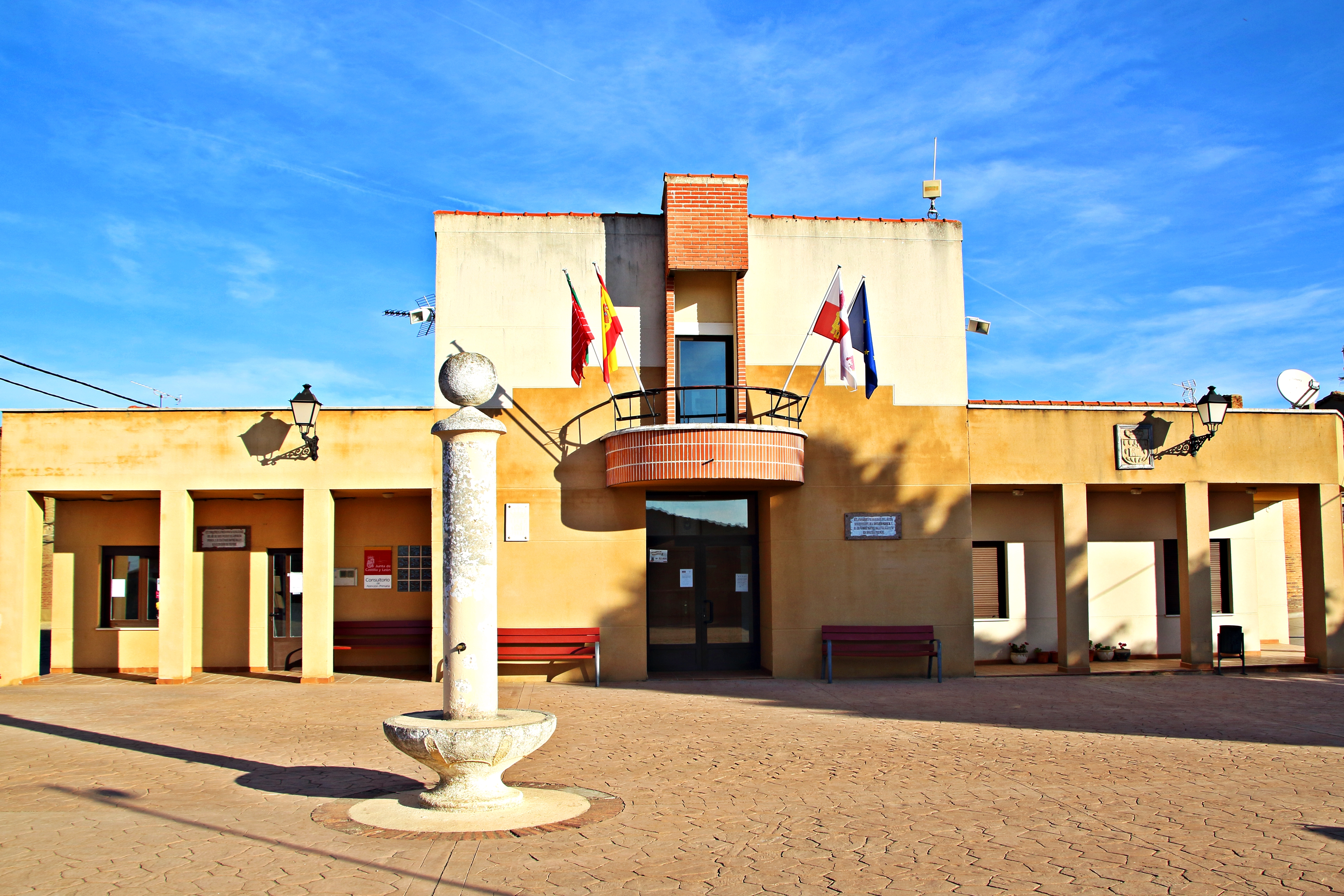 Villardondiego, provincia de Zamora